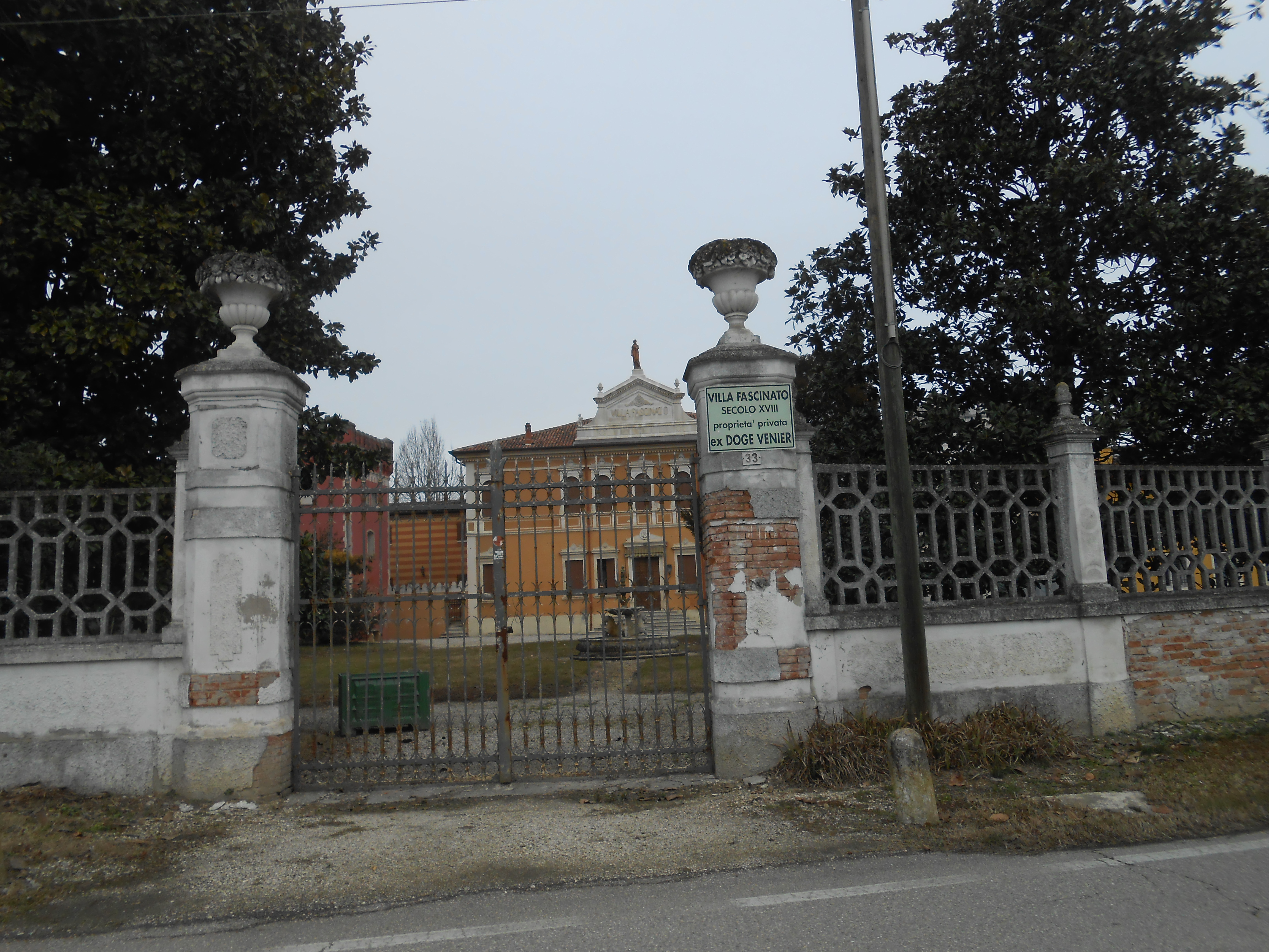 Villa Fascinato, Terrazzo